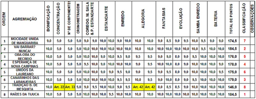 Resultados dos Blocos C - RJ 2020